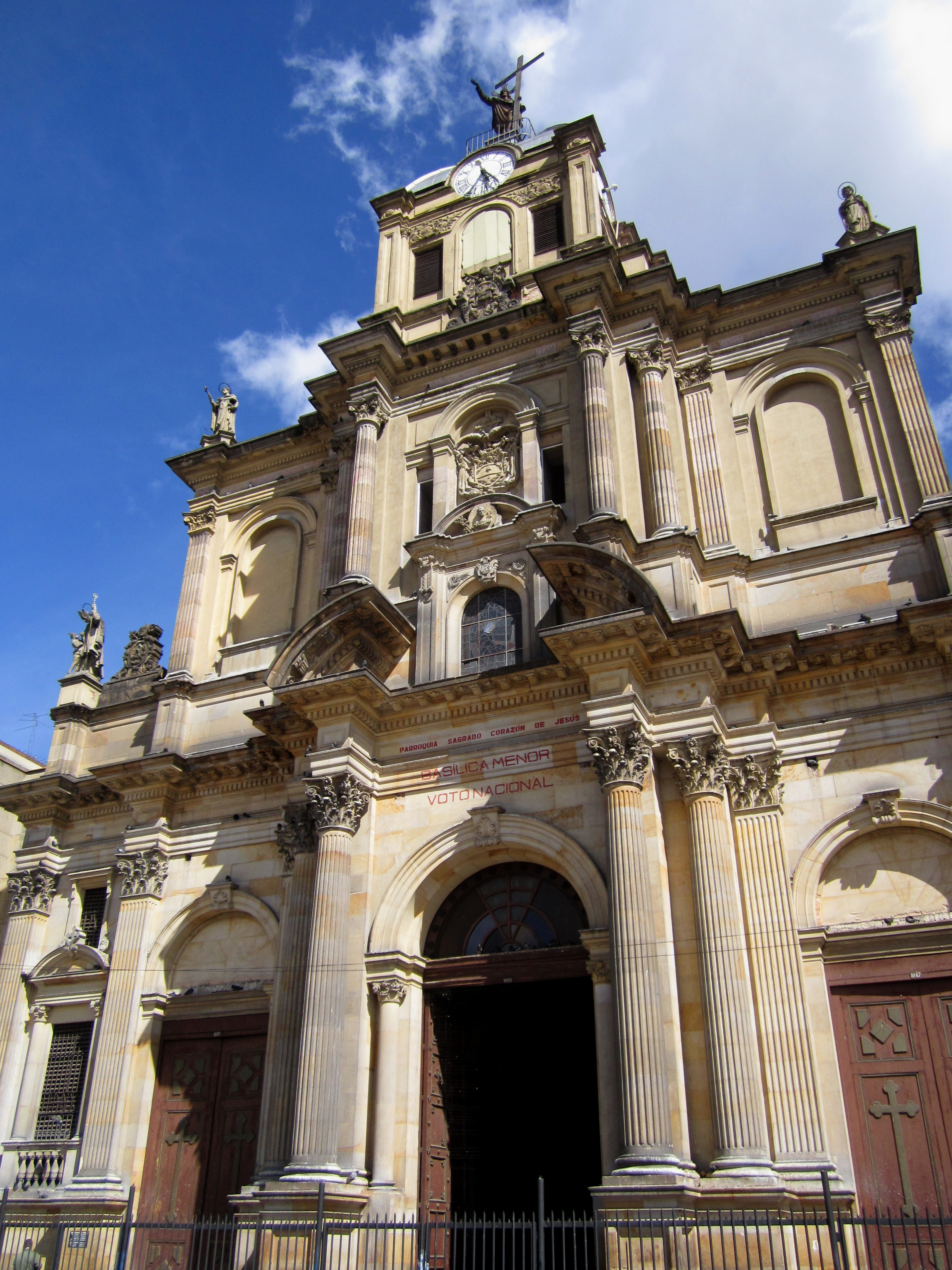 Bogotá